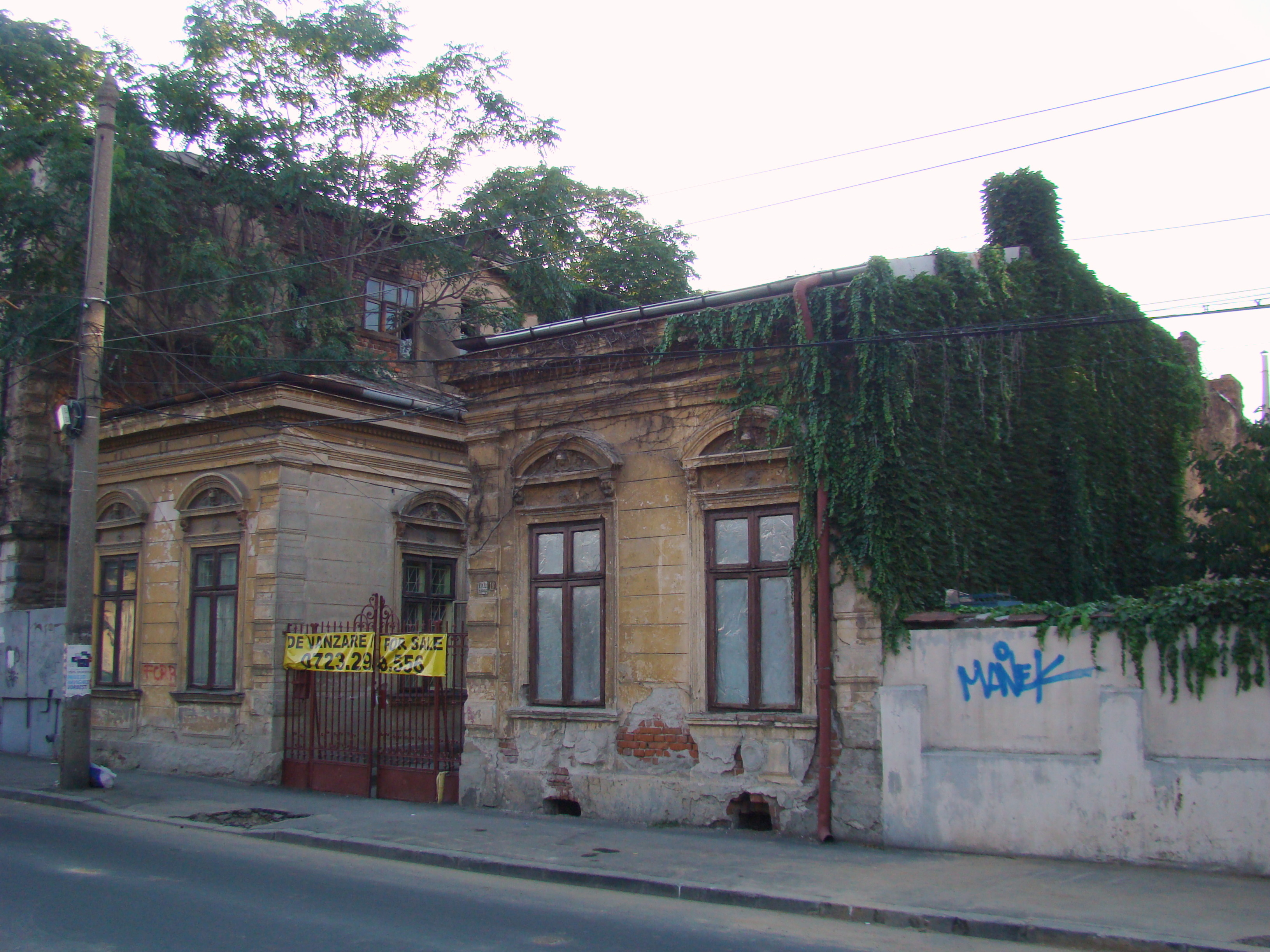 Clădire monument istoric, str. Mircea Vulcănescu, nr.10